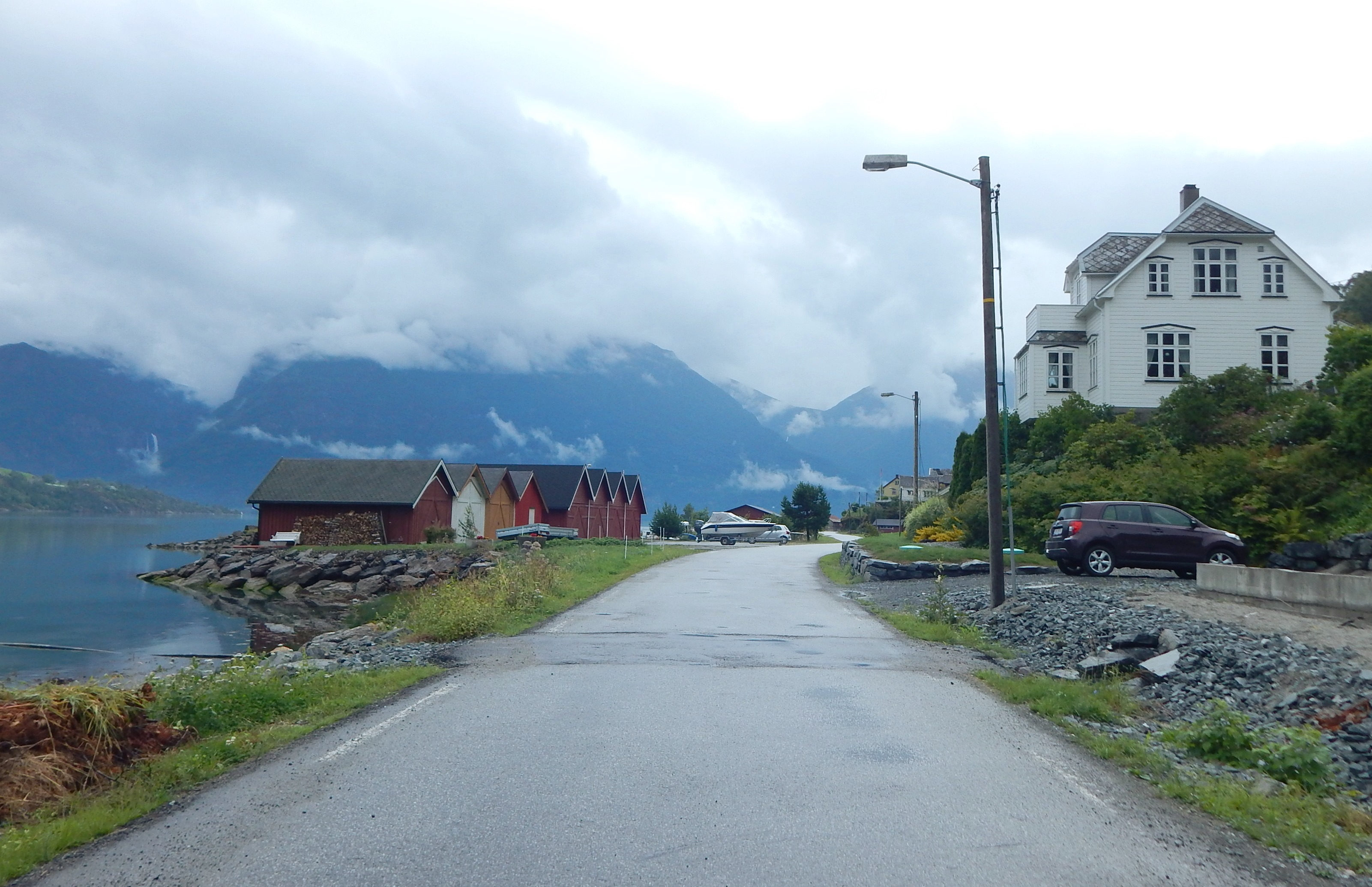 Fylkesvei 336 sørøstover fra Marifjøra